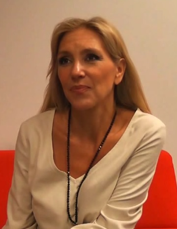 Entrevista a la escritora y periodista Marta Robles. Octubre 2012.